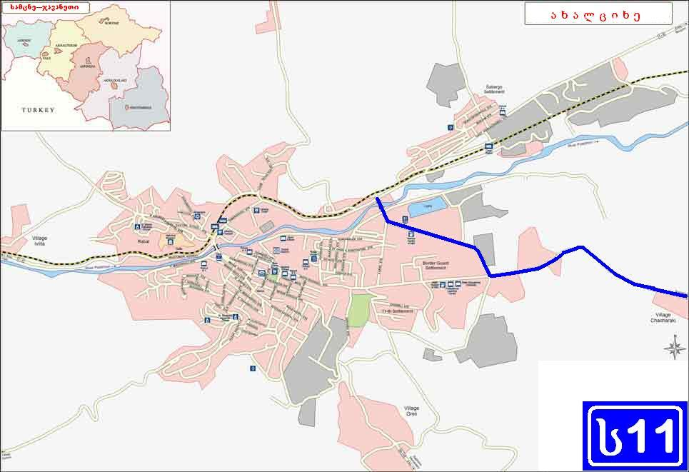 საქართველოს საავტომობილო მაგისტრალი ს11 ახალციხეში